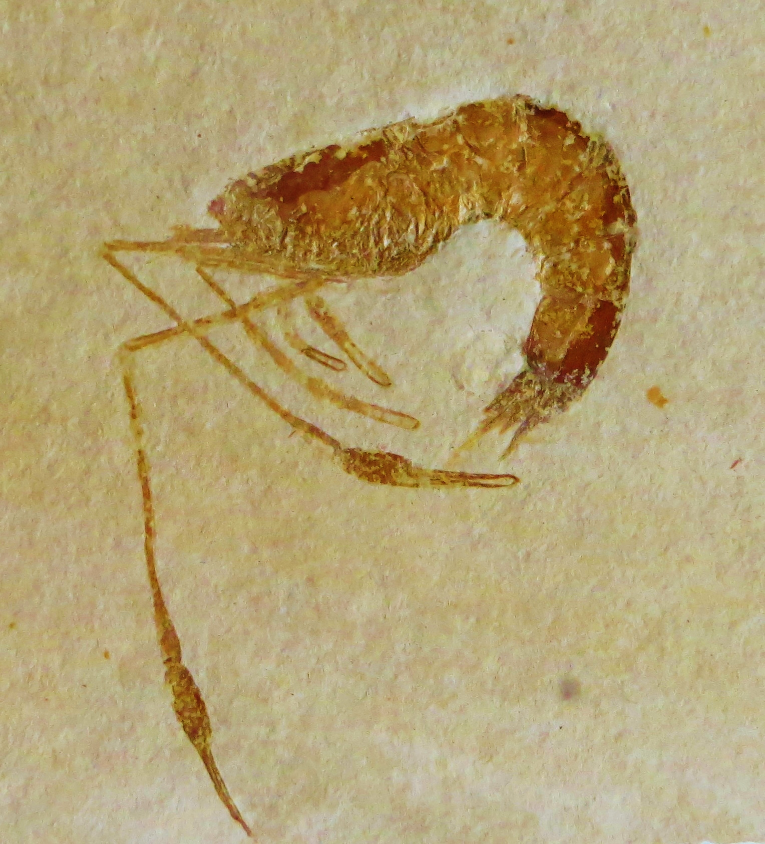 Fossil of Dusa, an extinct crustacean- Took the picture at Teylers Museum, Haarlem